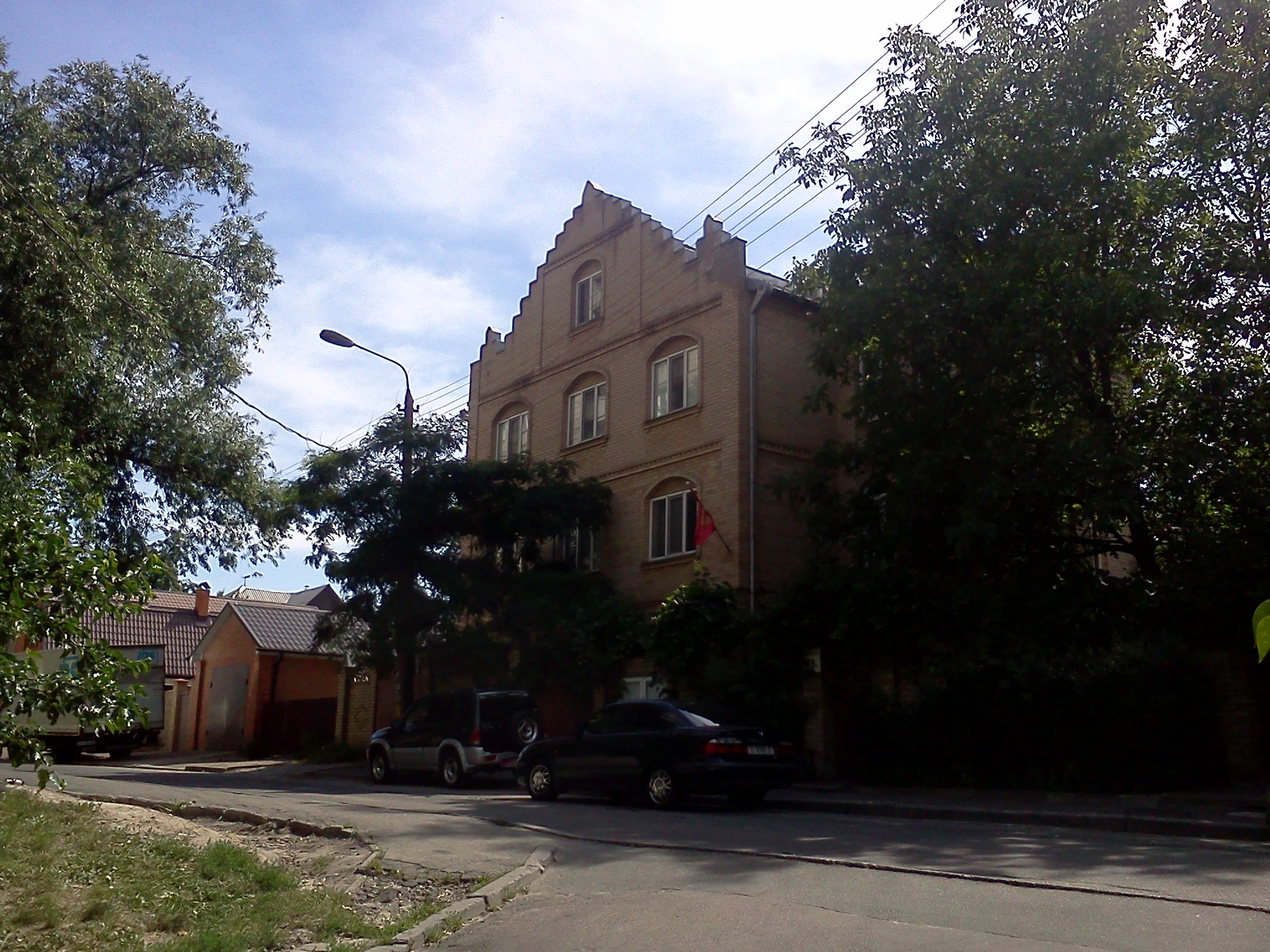 Посольство Киргизстану в Києві